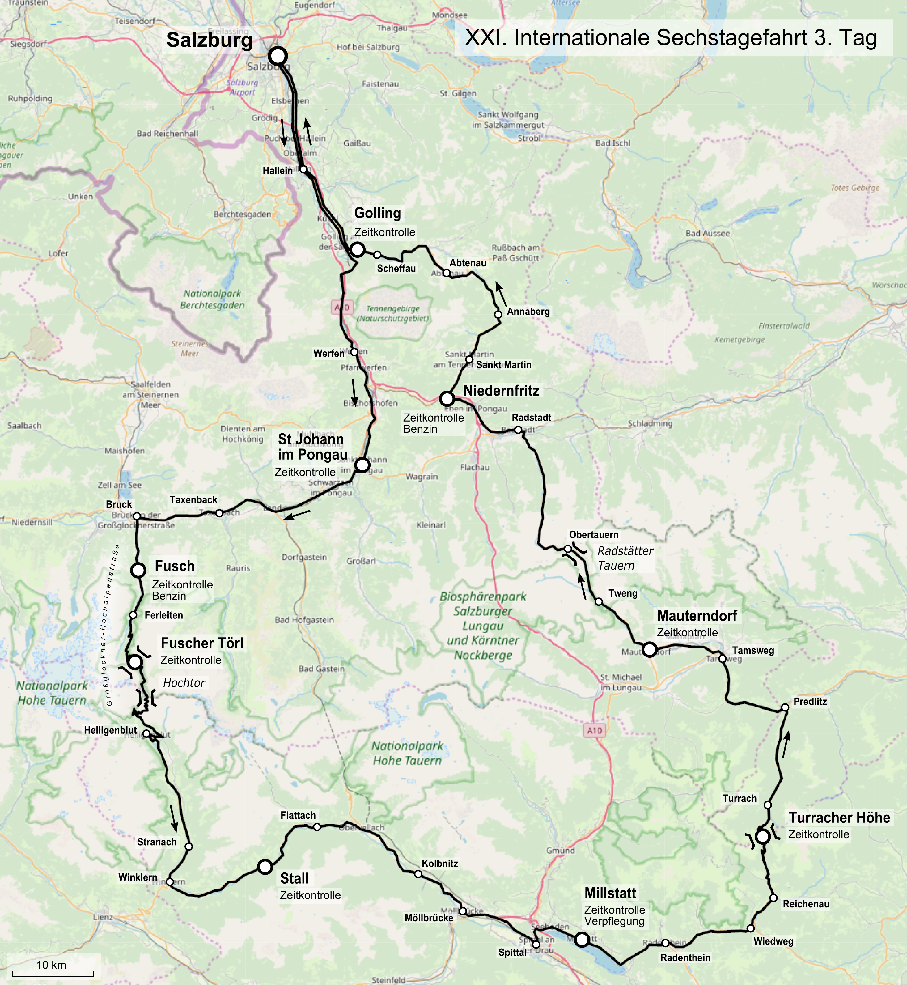 Karte der 21. Internationale Sechstagefahrt, Route des 3. Tages